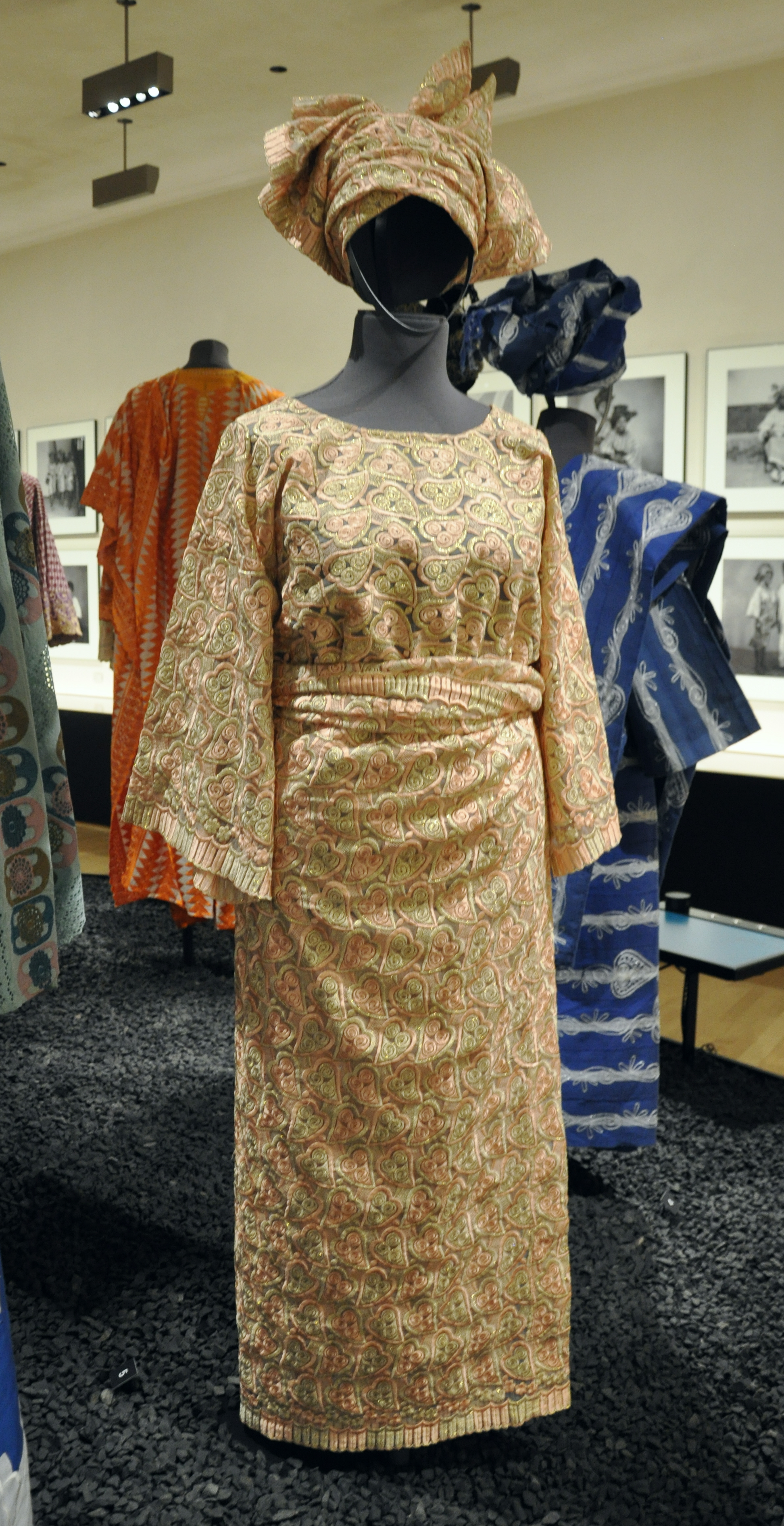 Dreiteiliges Damenkostüm mit Blatt-Motiv; Nigeria, um 1980; Polyesterorganza mit industrieller Allover-Lurex- und Viskose-Stickerei; Weltmuseum Wien, Inv. Nr. 187.523 a,b,c Fotografiert in der Ausstellung Lustenau Lagos African Lace im Vorarlberg Museum, Bregenz